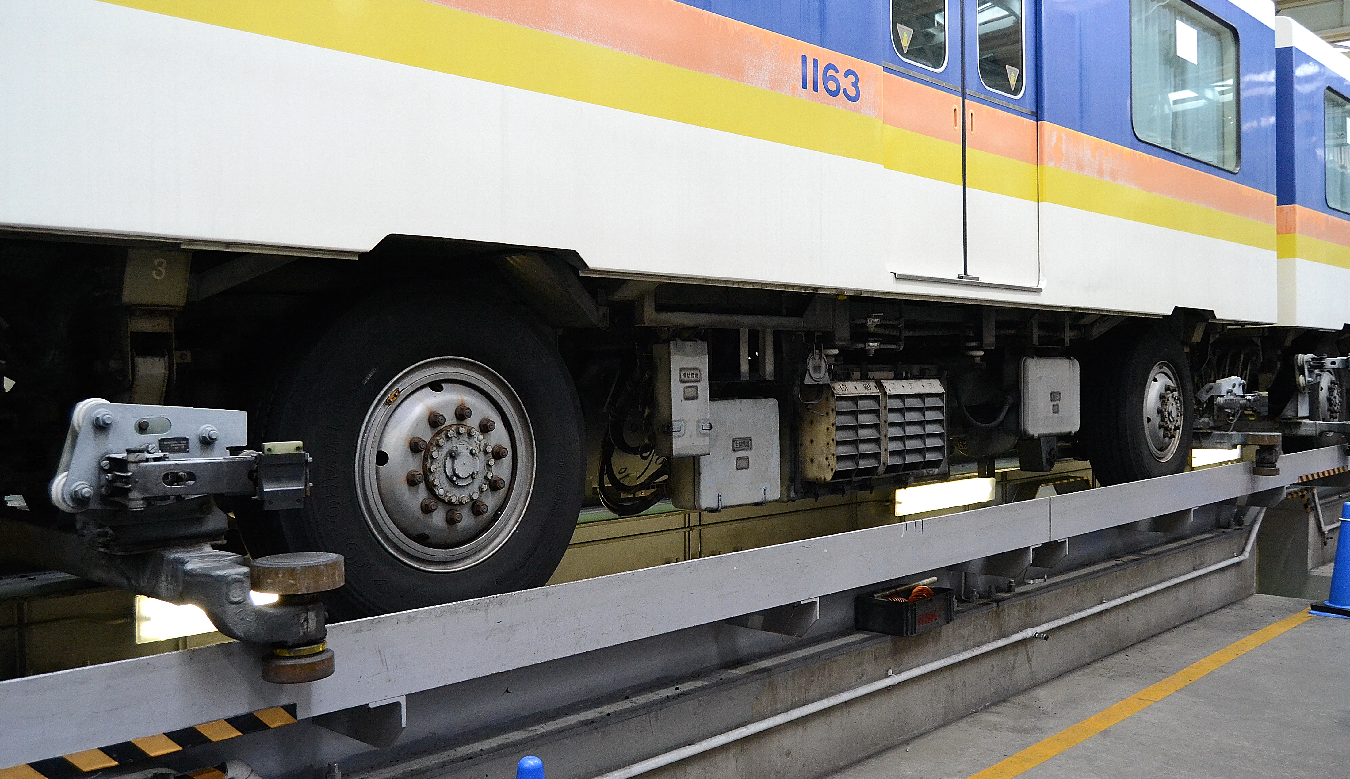 横浜新都市交通1000形の車体下部にある走行装置と案内輪（シーサイドラインフェスタでの車両基地公開時に撮影）。